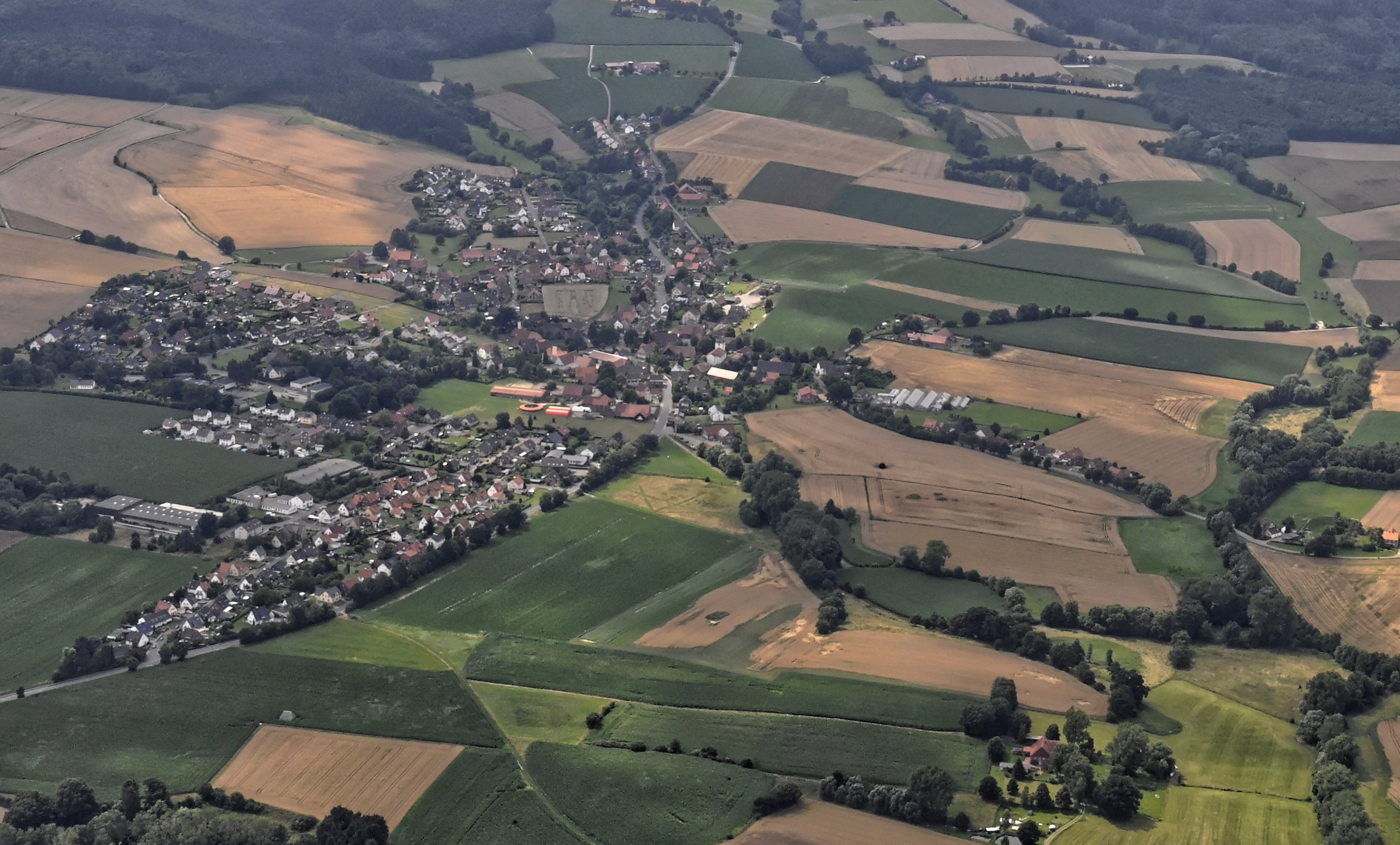 Bilder vom Flug Nordholz-Hammelburg 2015: Rinteln-Silixen